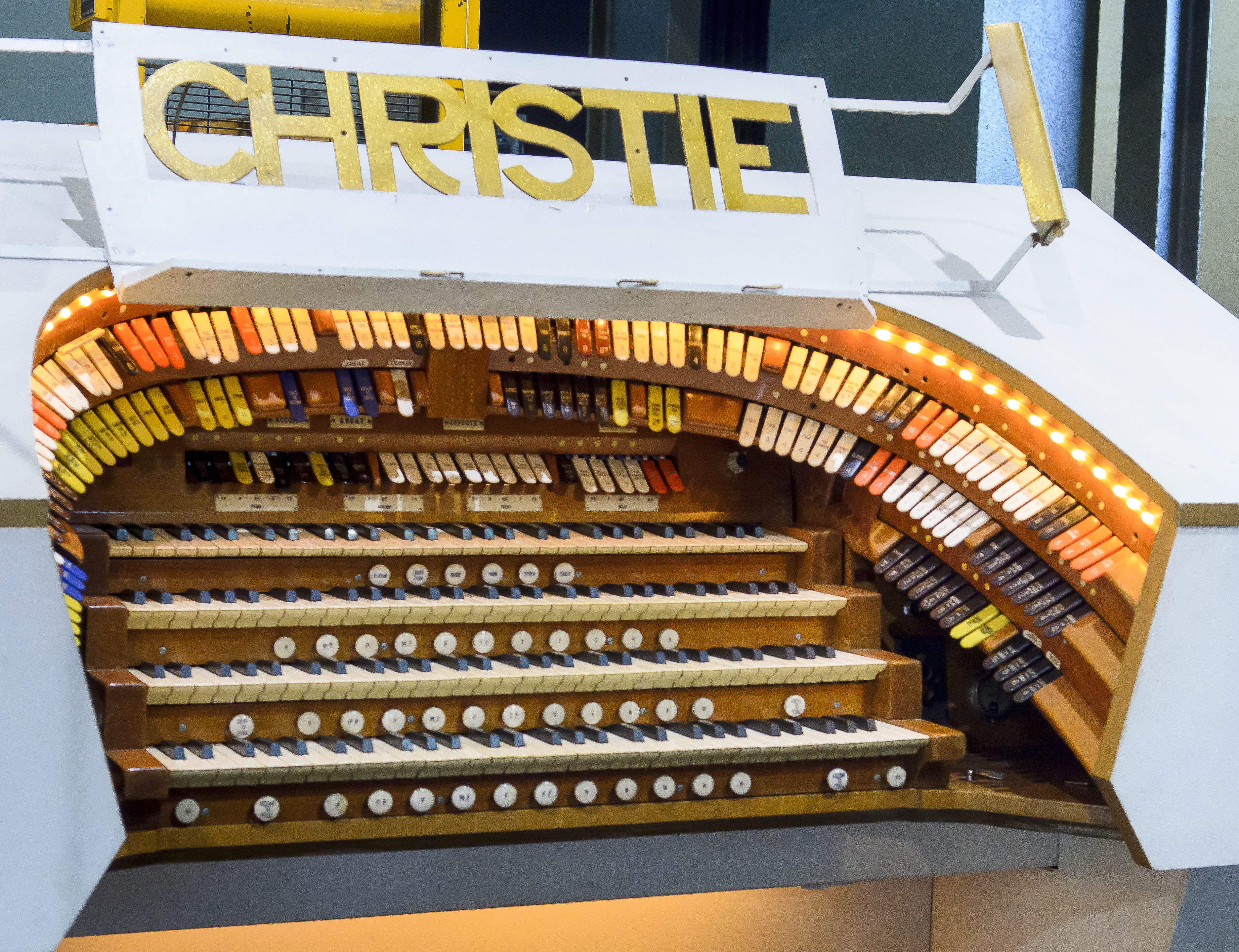 La console de l'orgue Christie du Pavillon Baltard de Nogent Sur Marne, ancien orgue du Gaumont Palace.